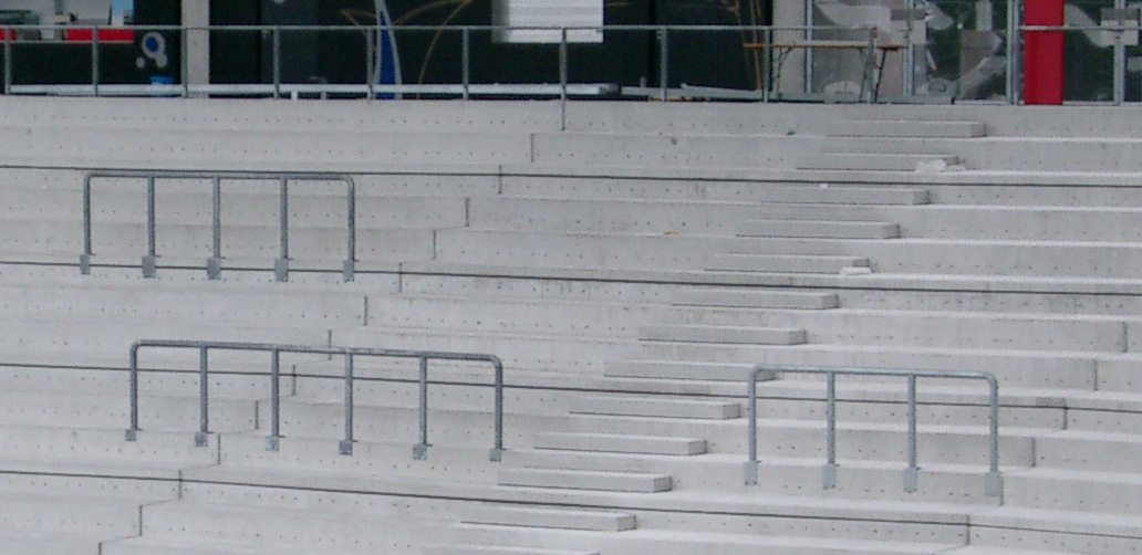 Wellenbracher im EM-Stadion Wals-Siezenheim)